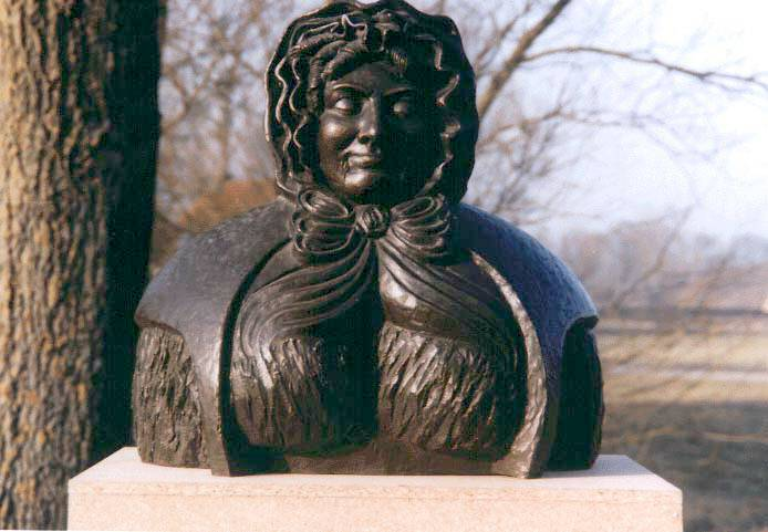 made by Ineke Ekkers in 2001